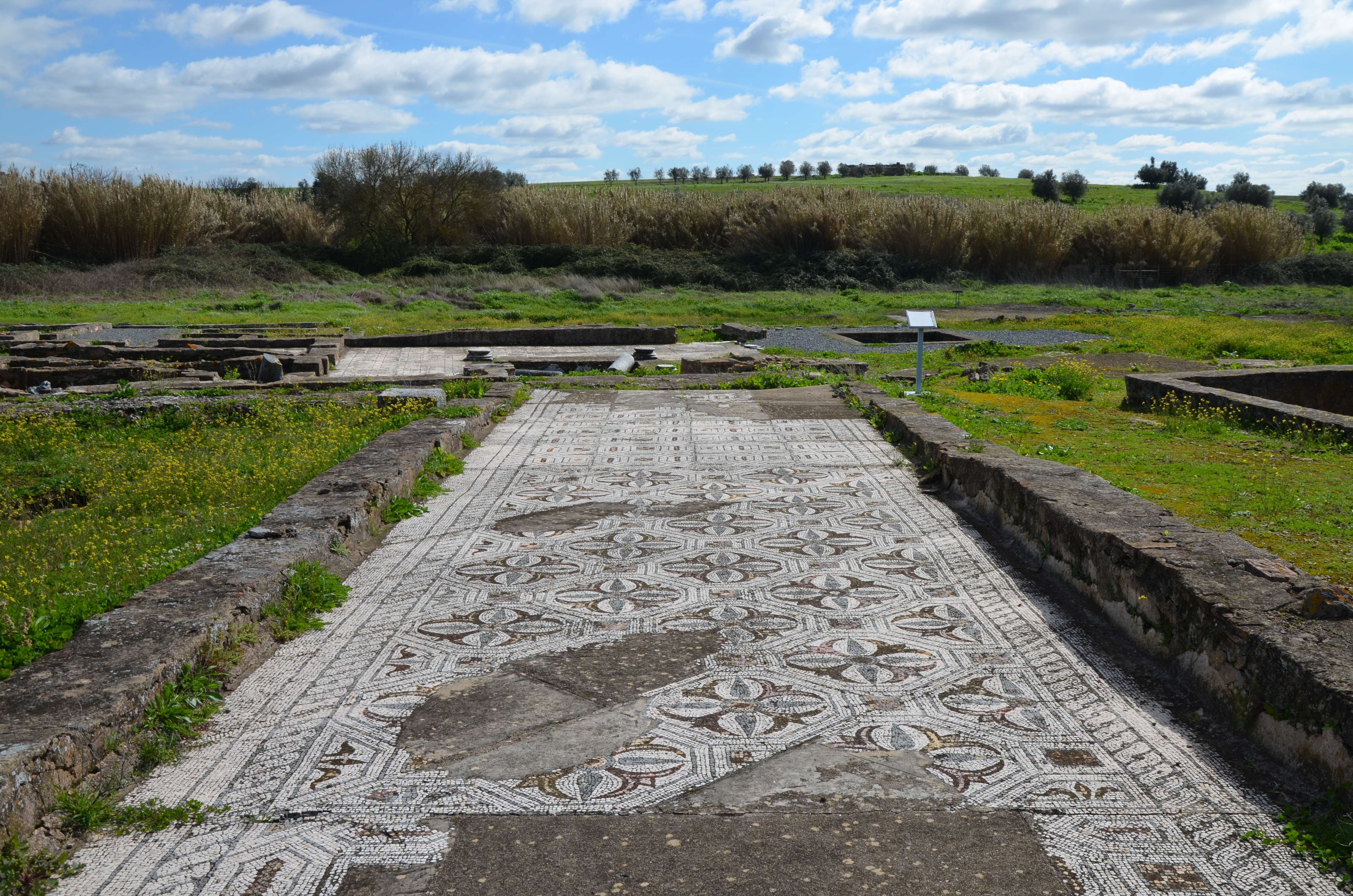 Roman Villa of Pisões, Portugal Roman villa, Pisões